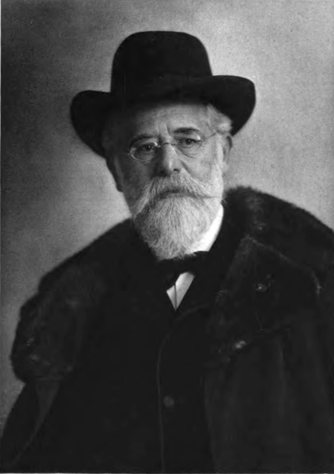 Gustav Tschermak (1836-1927), Austrian scientist (mineralogist)